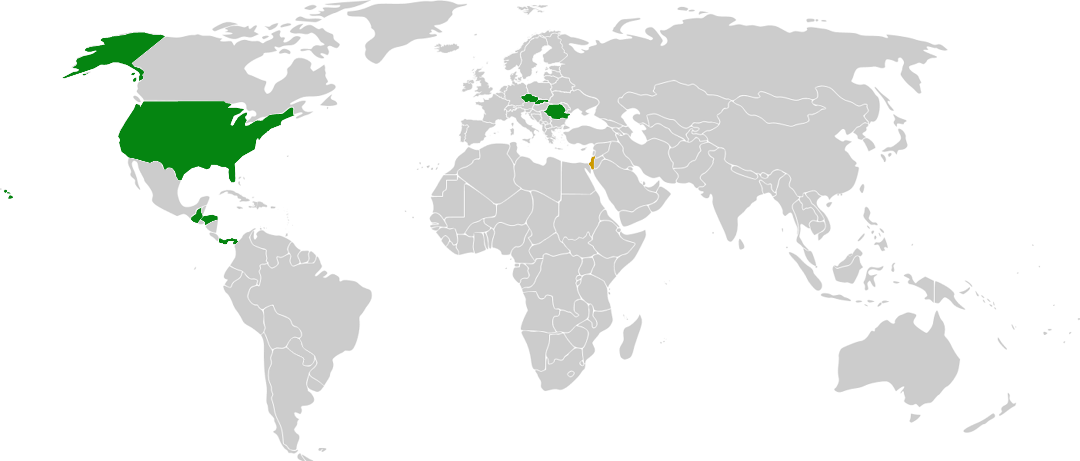 מדינת ישראל הביעו נכונות להעביר השגרירות בקרוב